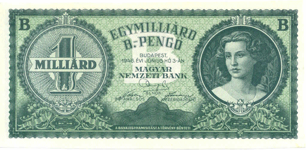 1.000.000.000 Bio. Hungarian pengő (1946) - obverse - NEVER ISSUED